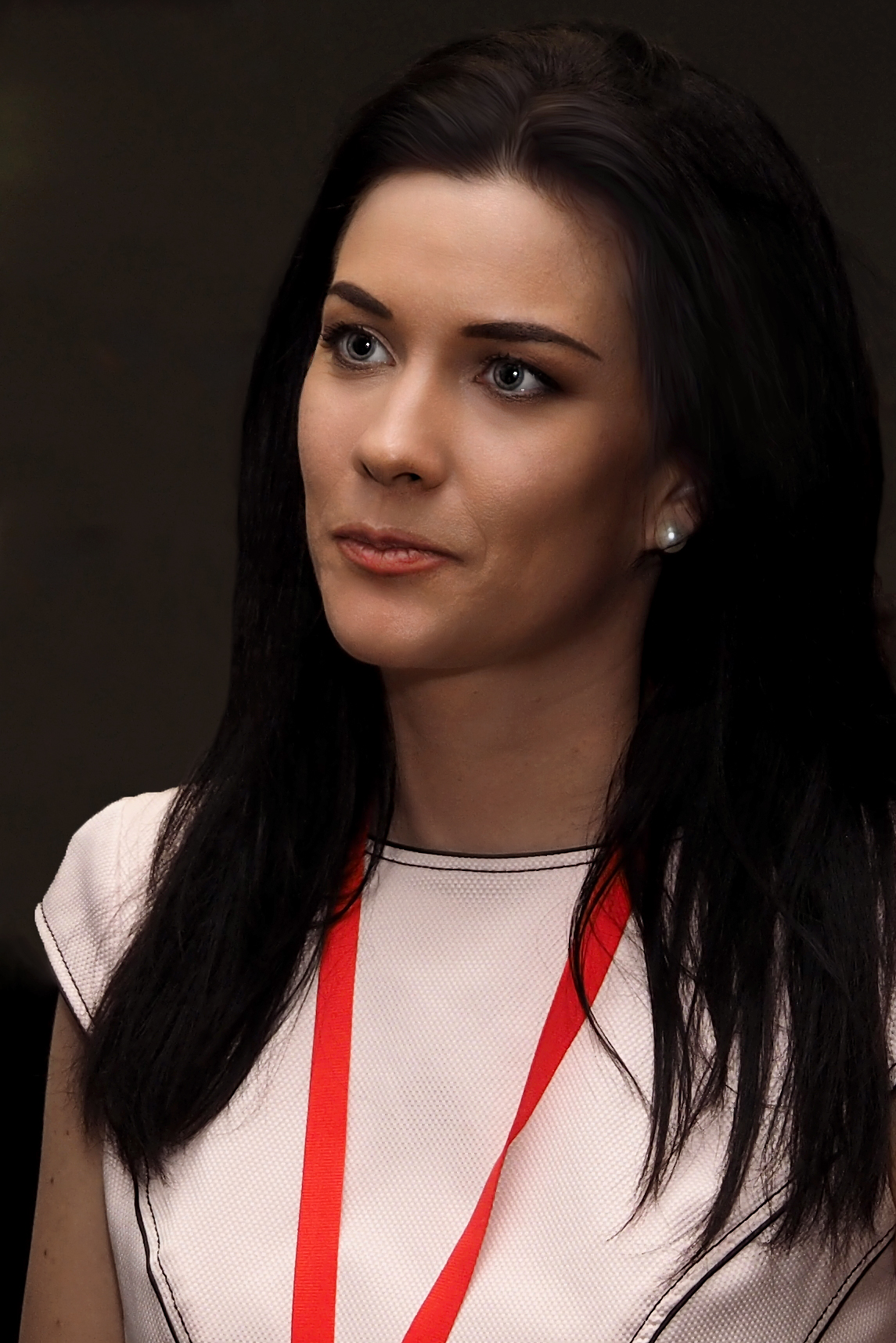 MSZP 2014. júliusi kongresszusa. Demeter Márta